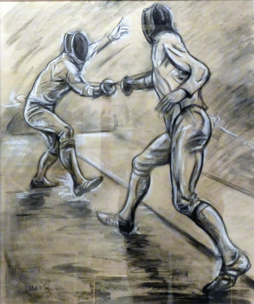 Jean Jacoby: Eng Zeechnung.